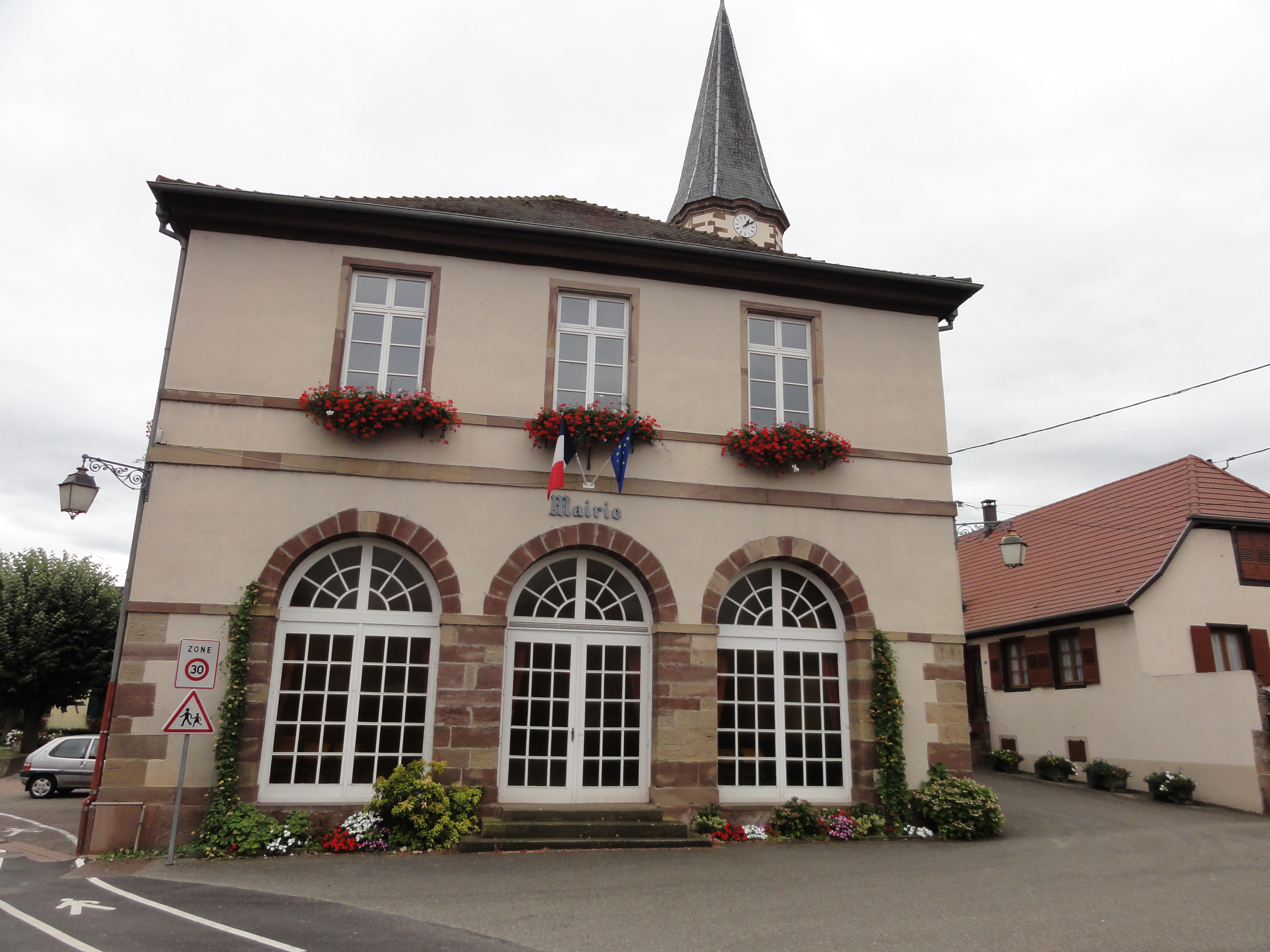 Alsace, Bas-Rhin, Stotzheim, Mairie (XIXe), route Romaine. .